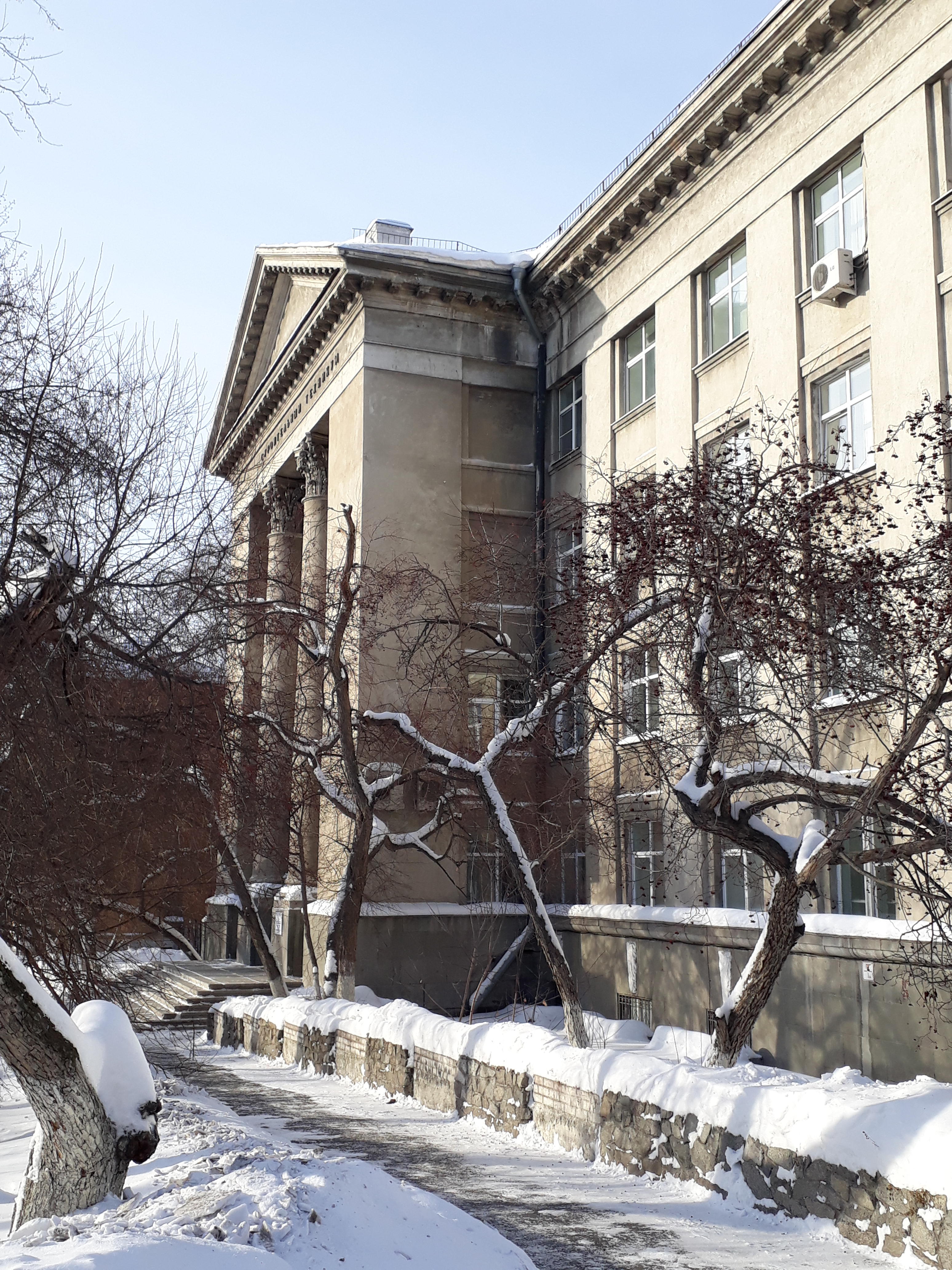 Улица Малышева. Февраль 2019